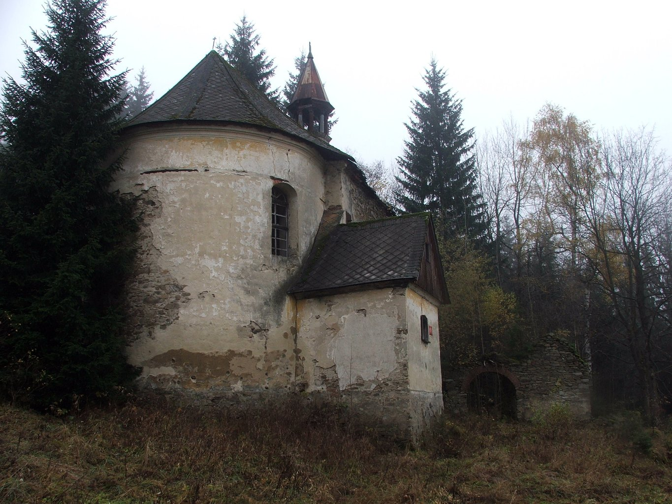 Ruina kościoła w Janowej Górze (powiat kłodzki, woj. dolnośląskie, gm. Stronie Śląskie)